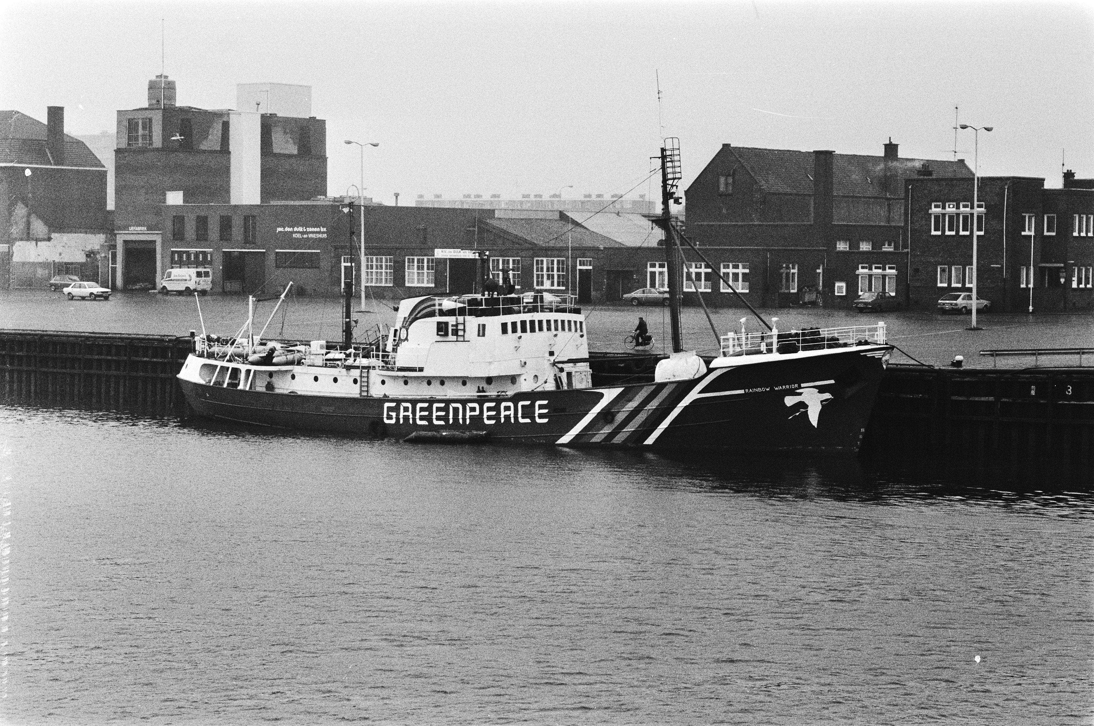 Collectie / Archief : Fotocollectie Anefo Reportage / Serie : [ onbekend ] Beschrijving : Schip "Rainbow Warrior" van Greenpeace in Scheveningen Datum : 11 mei 1979 Locatie : Scheveningen, Zuid-Holland Trefwoorden : havens, schepen Fotograaf : Suyk, Koen / Anefo Auteursrechthebbende : Nationaal Archief Materiaalsoort : Negatief (zwart/wit) Nummer archiefinventaris : bekijk toegang 2.24.01.05 Bestanddeelnummer : 930-2632